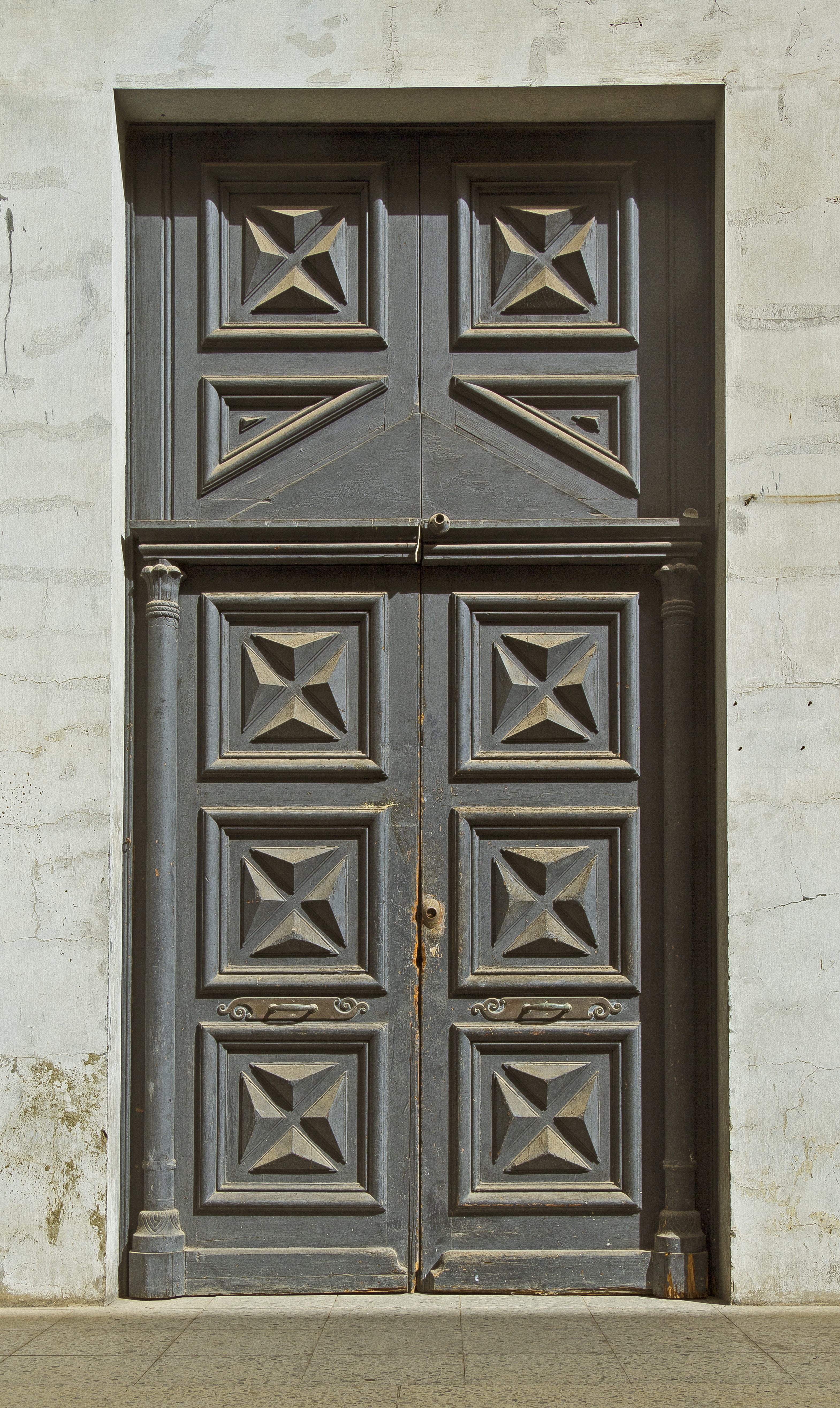 Tür des „Templo Masónico“ in Santa Cruz de Tenerife